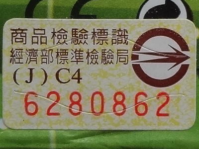 中華民國經濟部標準檢驗局商品檢驗標識 (J)C4 6280862